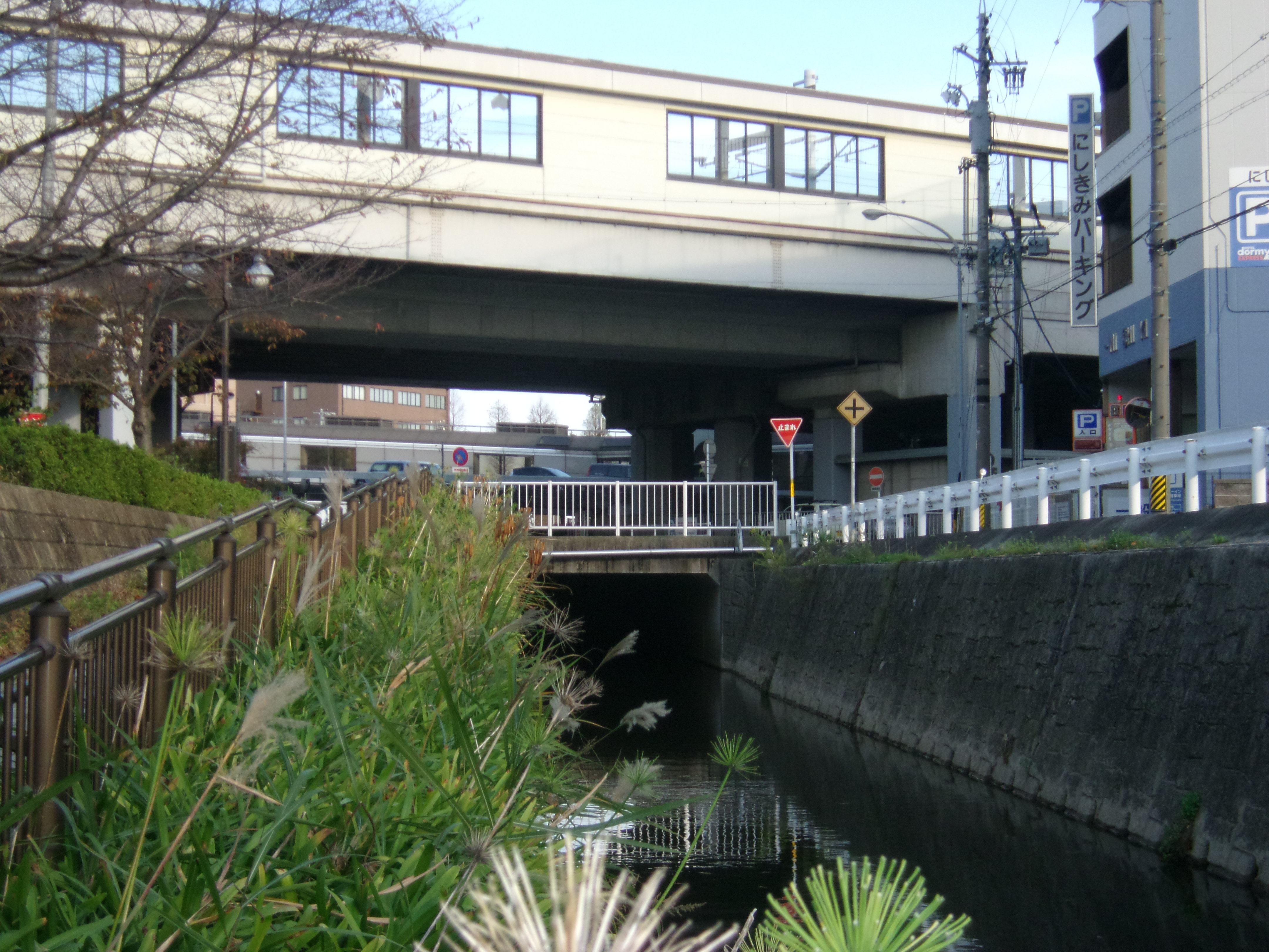 東海道新幹線三河安城駅ホーム下を流れる明治用水